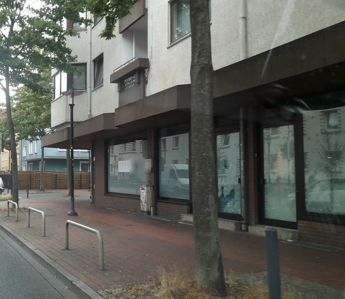 Moschee des Deutschsprachigen Islamkreises (DIK) in der Martin-Luther-Straße in Hildesheim